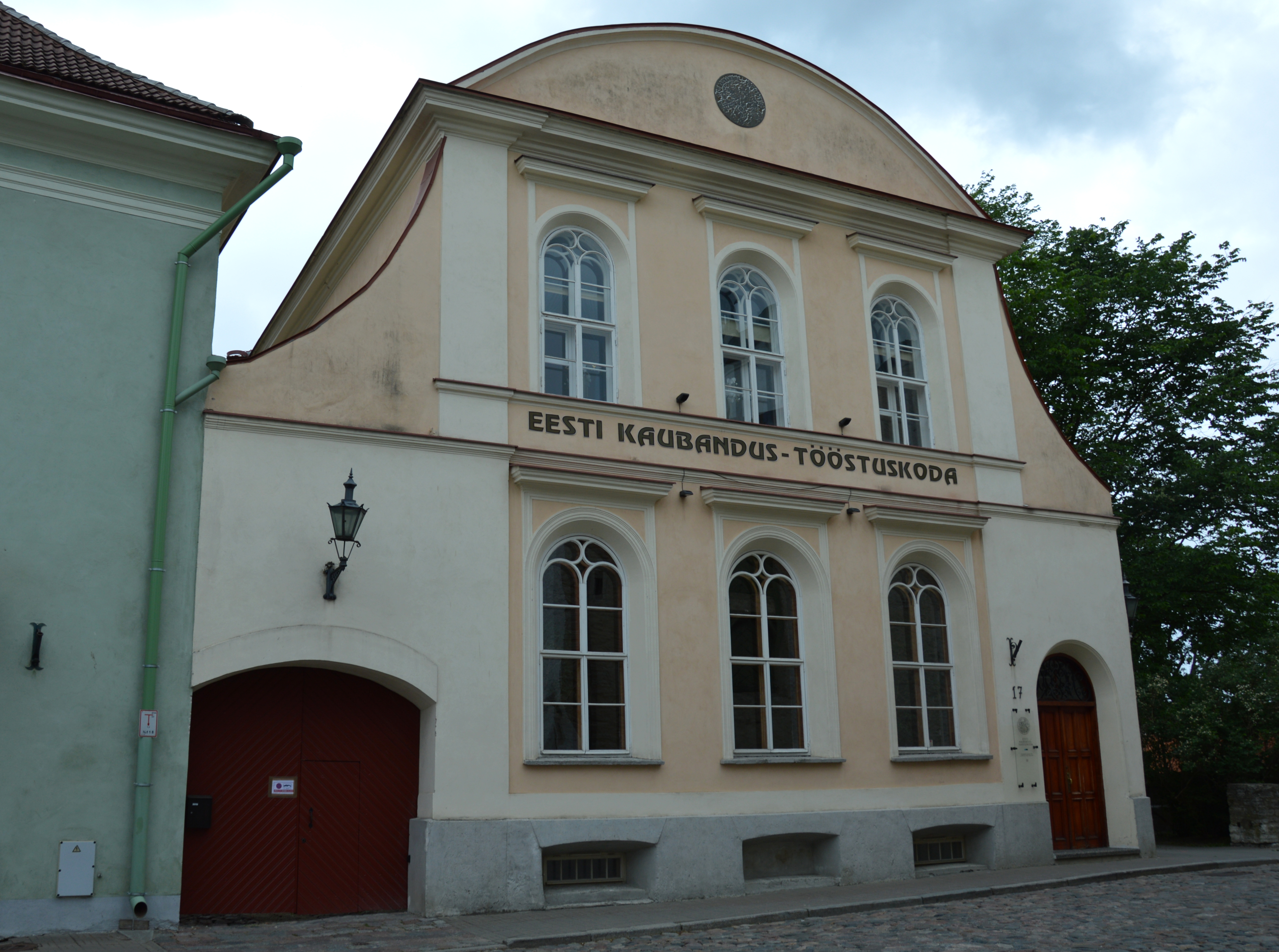 Estnische Industrie- und Handelskammer Dom-Schulstraße 17